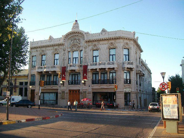 Teatro Bartolomé Maccio - San José, Uruguay